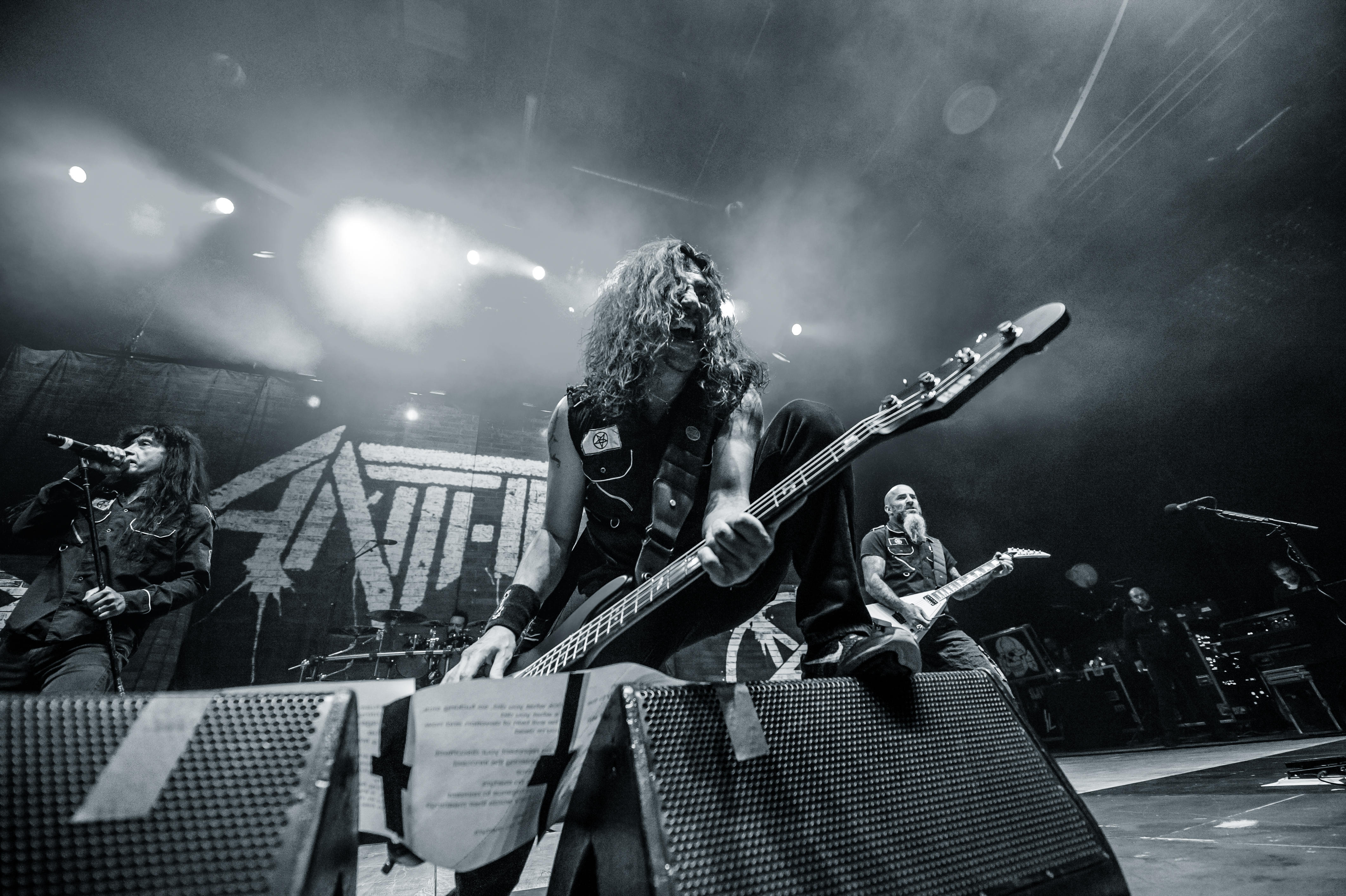 'Anthrax - Support Slayer Tour 2015 Bochum'